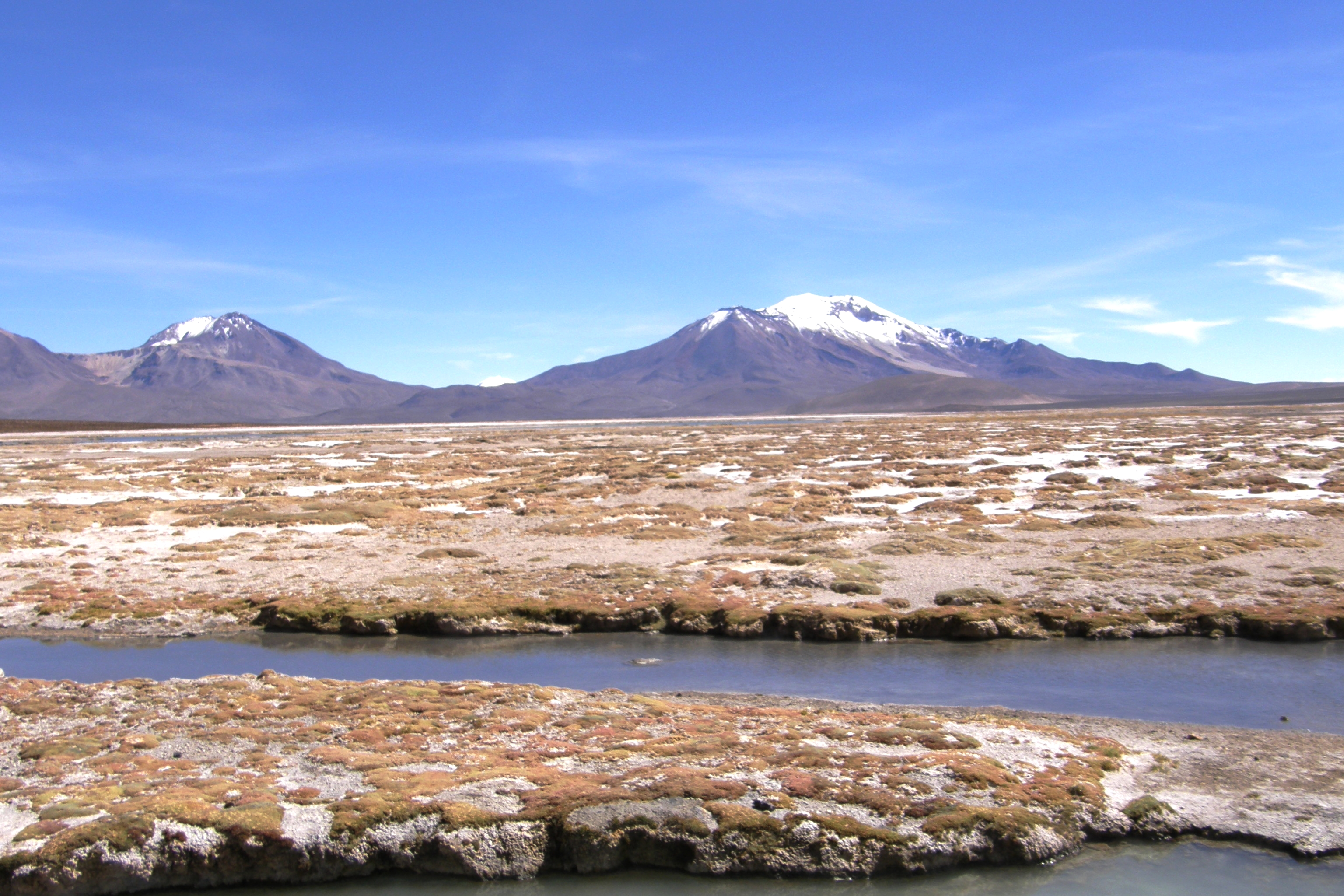 Thermes de Polloquere au sud su salar de Surire photo prises vers 10h du matin vers l'est.